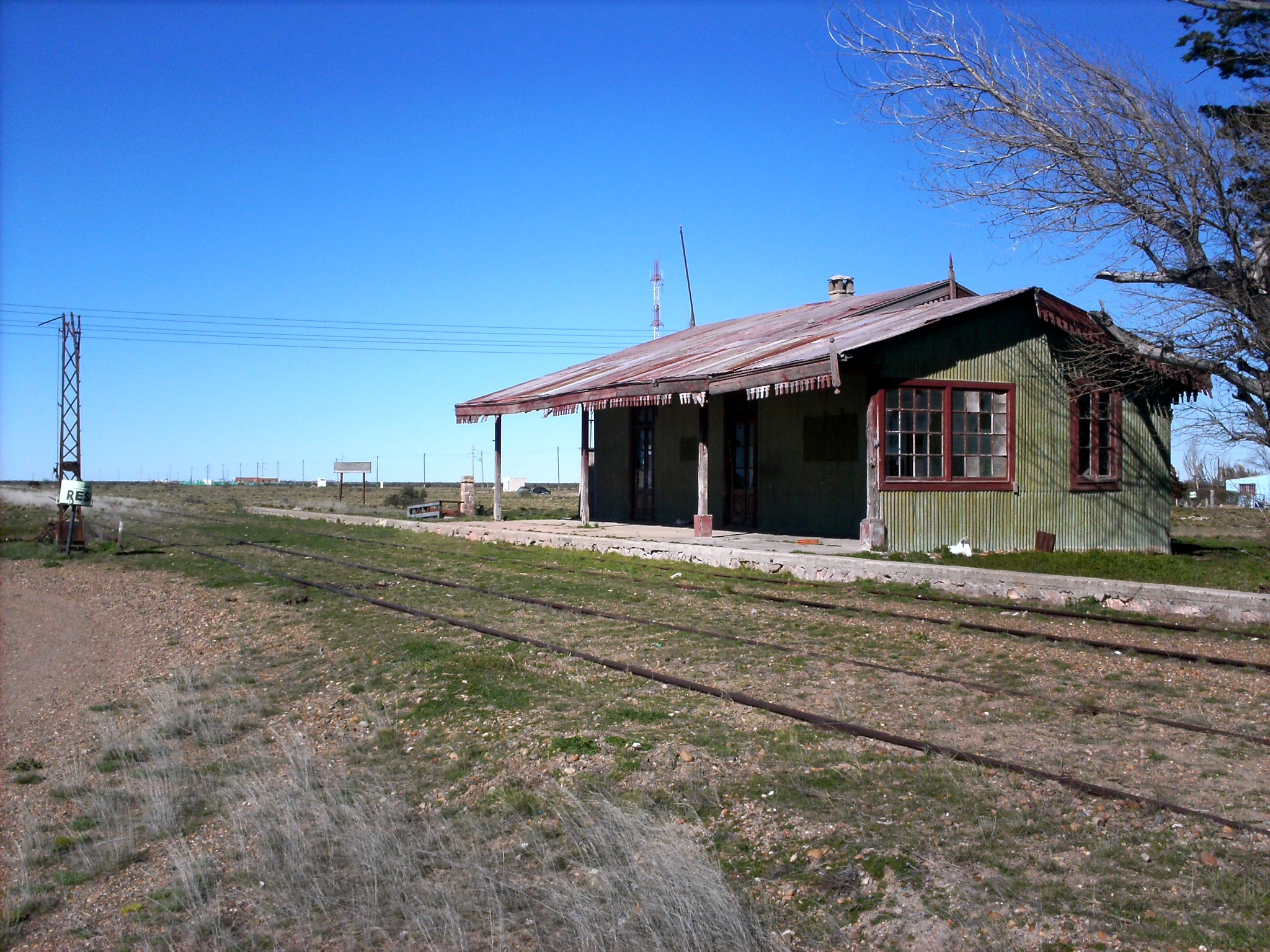 La estación Fitz Roy conservada, pero abandonada